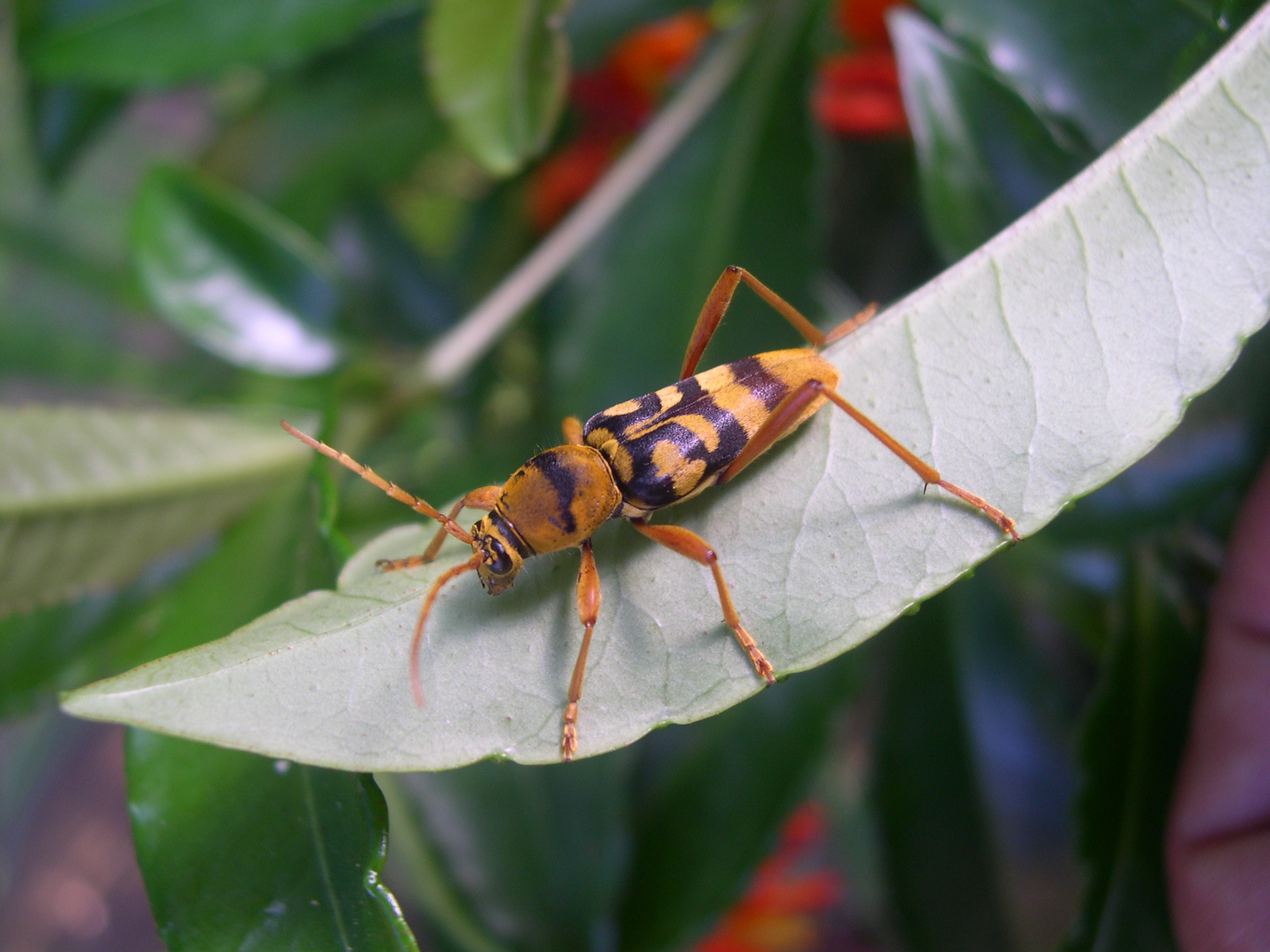 ヨツスジトラカミキリ Chlorophorus quinquefasciatus (Castelnau et, Gory, 1841)（Cerambycidae）, 神奈川県横浜市（Yokohama, Kanagawa pref., Japan.）